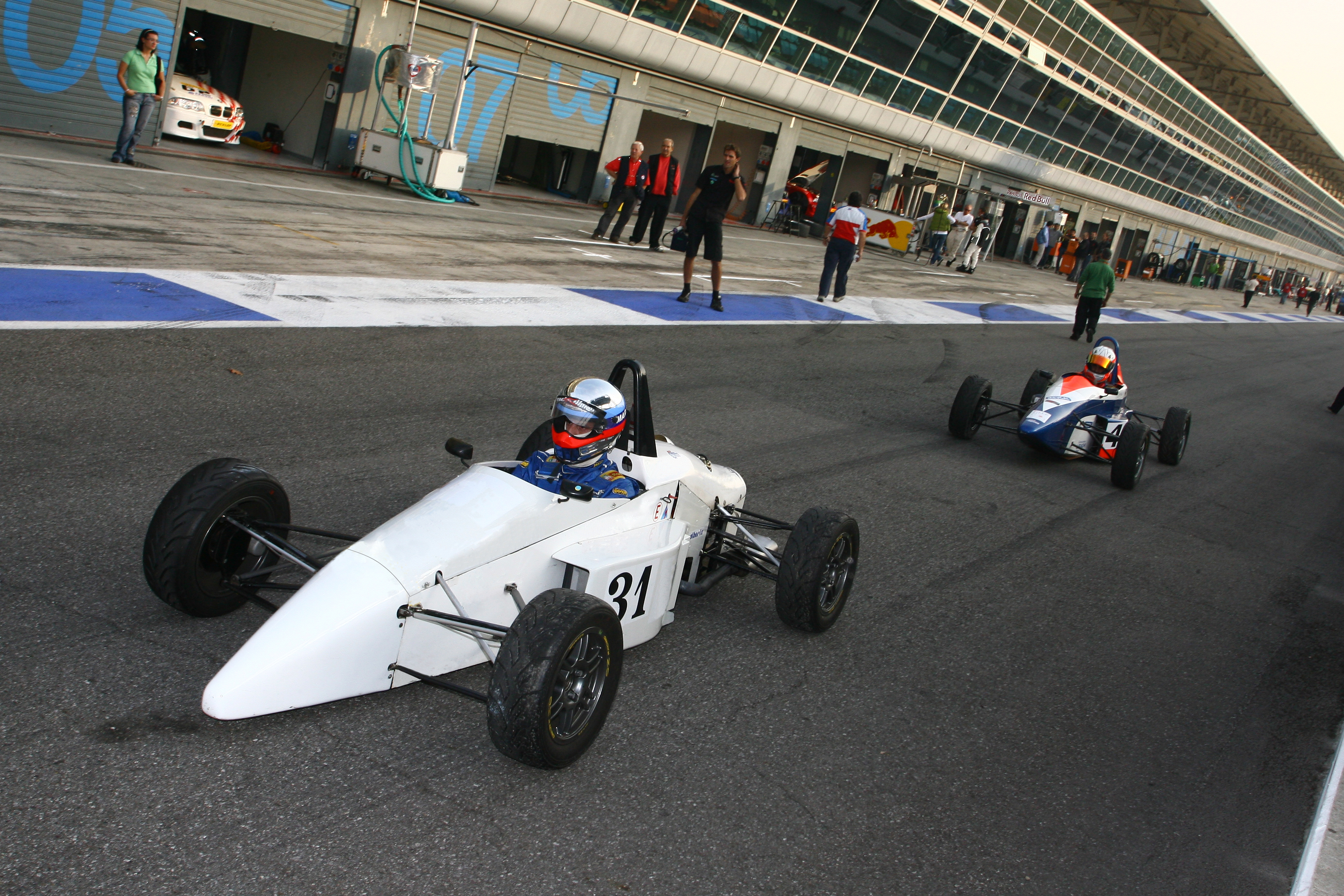 Foto formula Junior